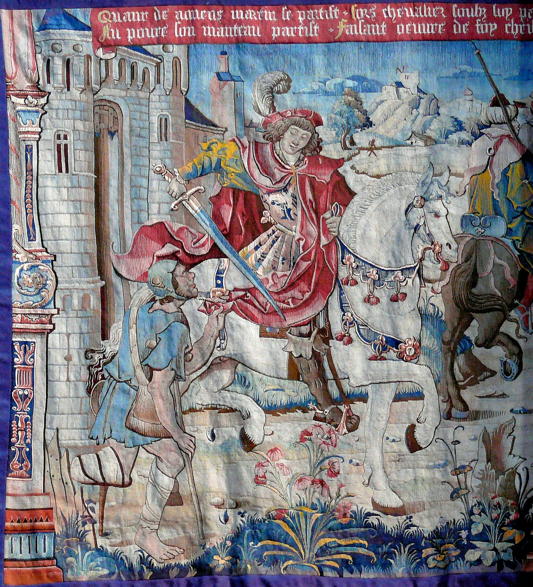 Montpezat-de-Quercy - Collégiale Saint-Martin - Tapisserie de la vie de Saint-Martin